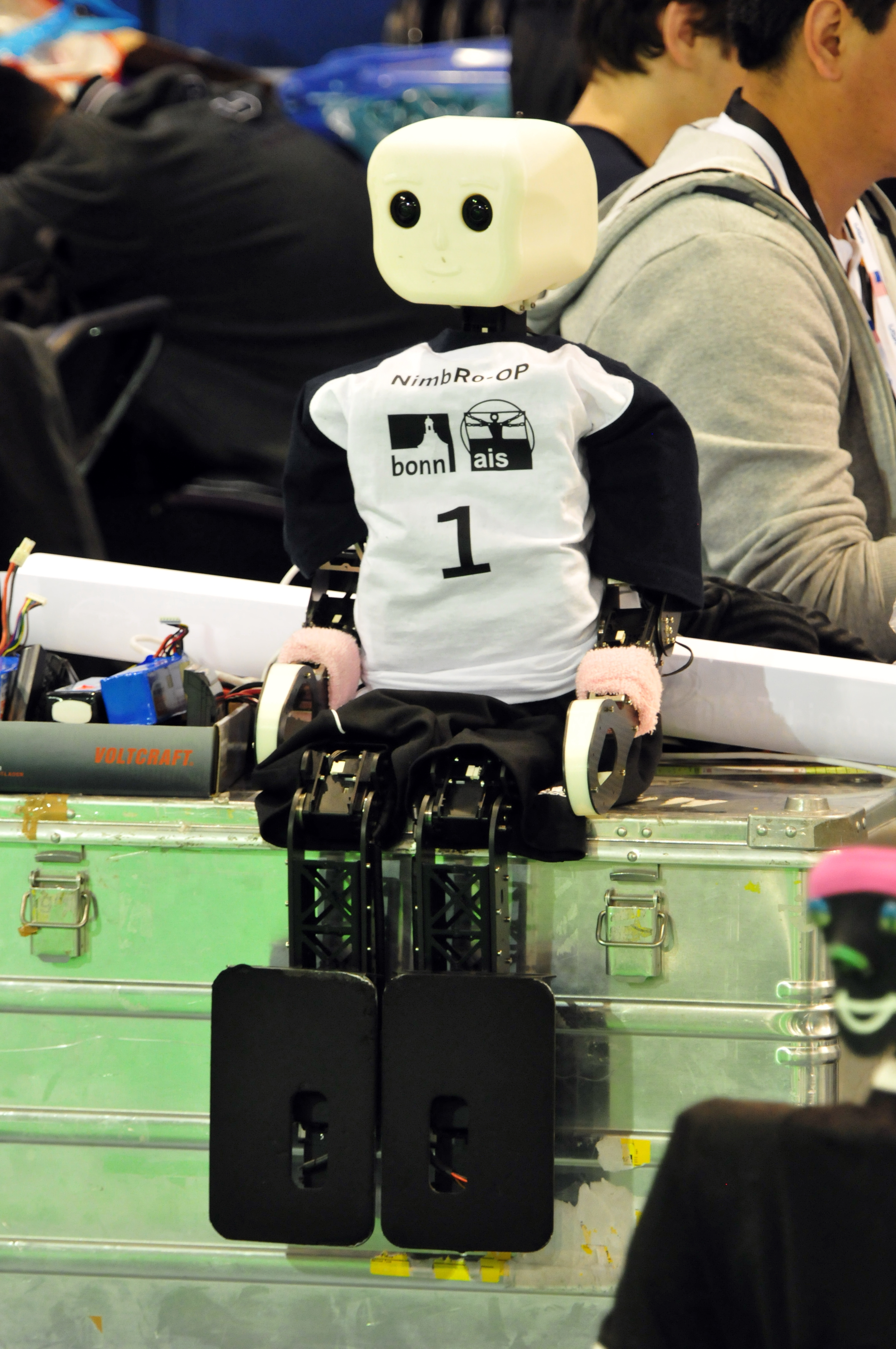 Eindhoven, Niederlande, Robocup 2013